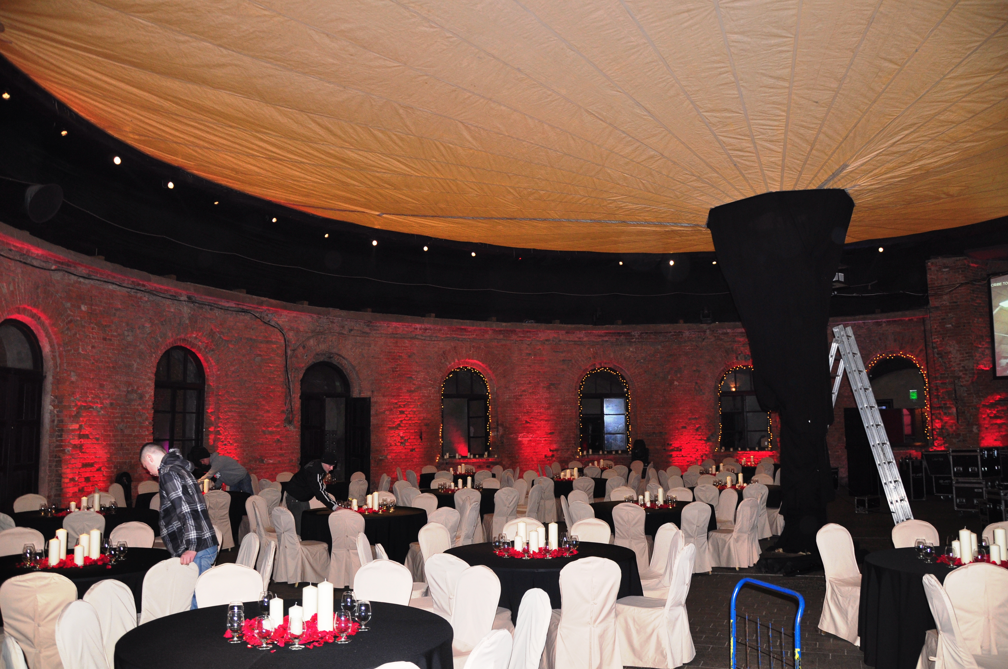 Geburtstagsveranstaltung für Warschauer Gastronom im Fort Legionow, Warschau